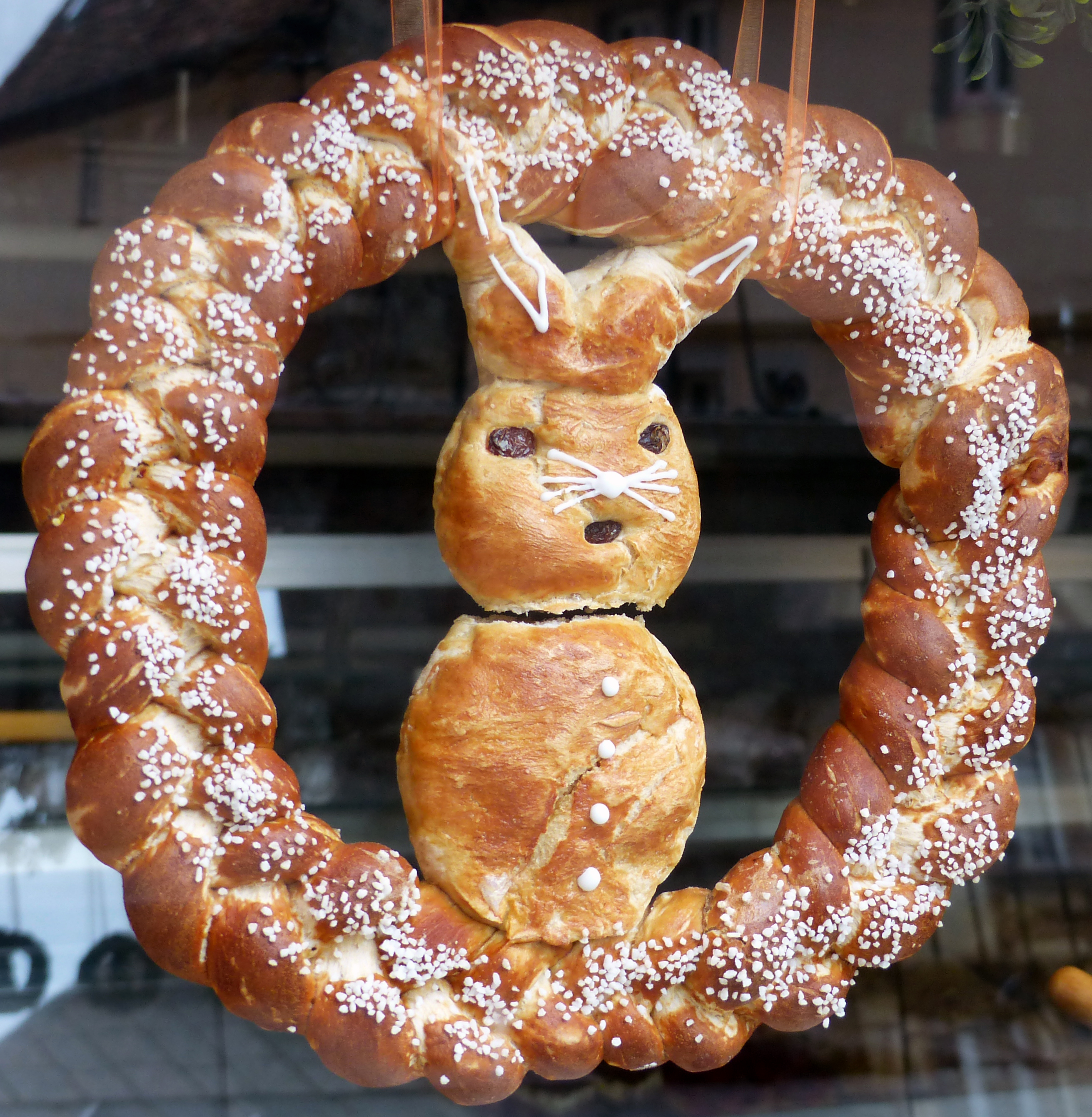 Osterbrot in Rothenburg ob der Tauber